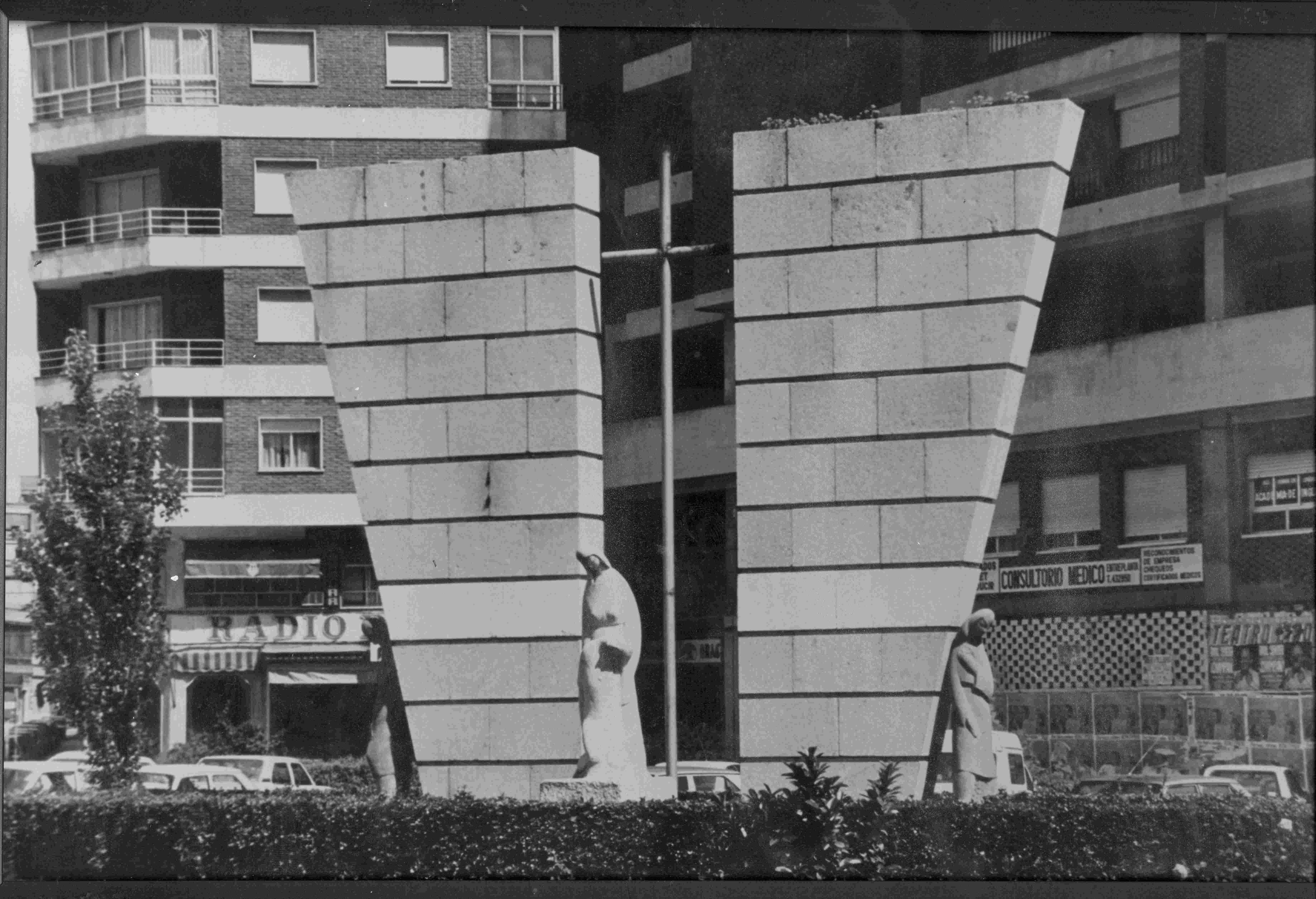 Monumento a los caídos en el trabajo